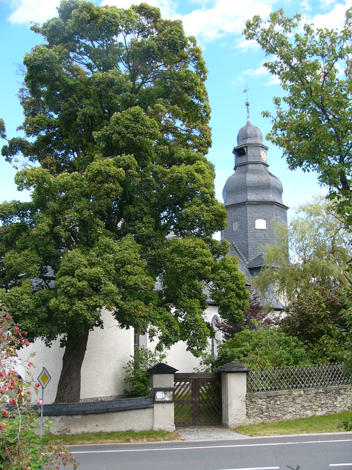 Heinersdorf, Stadtteil von Wurzbach